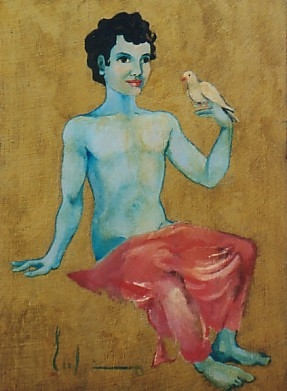 Krishna de la Paz, óleo del pintor español Eulogio Díaz del Corral